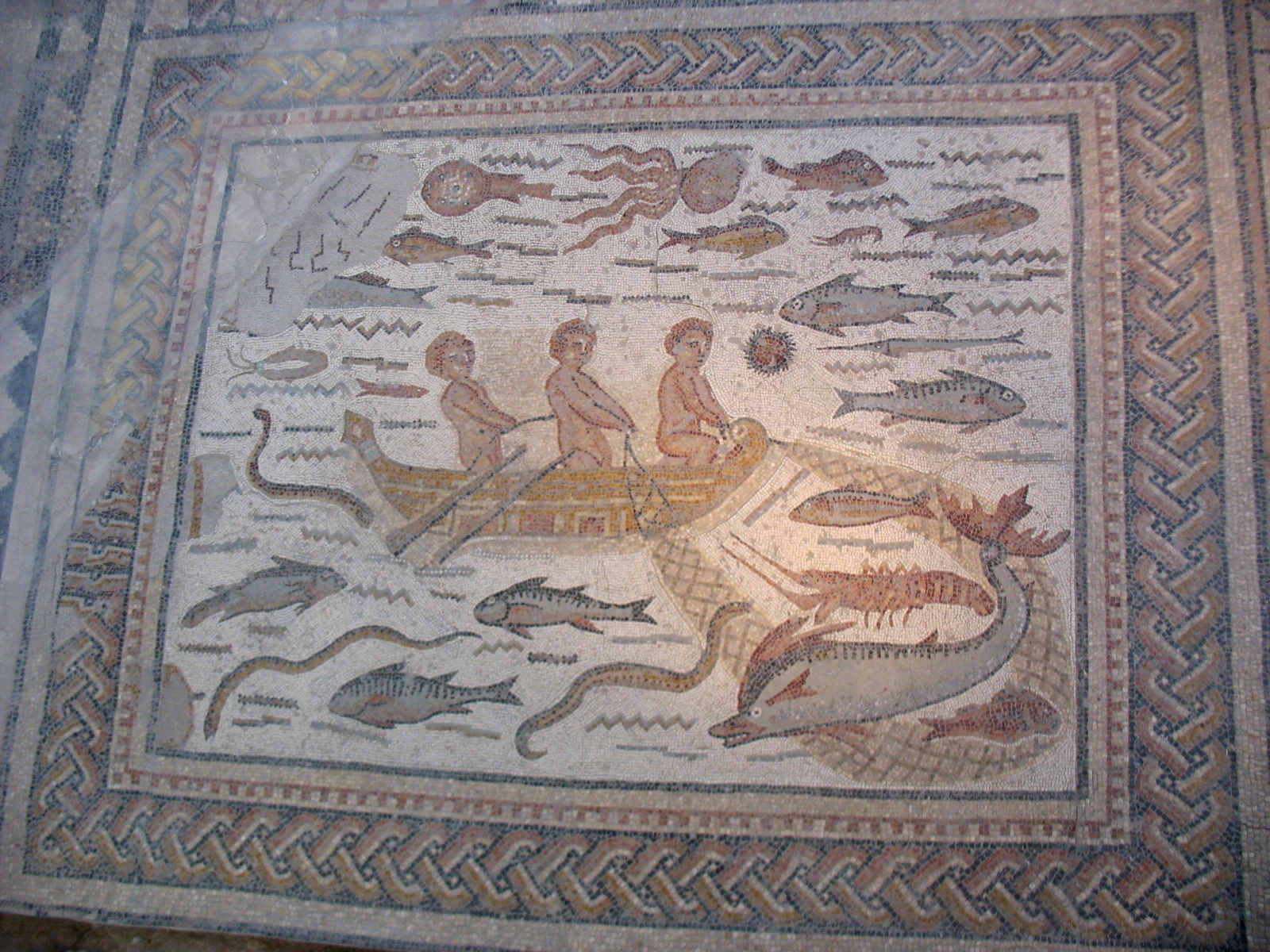 Casa de Hippolytus. Mosaico. Alcalá de Henares, Madrid, España